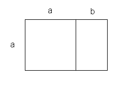 Rechthoek die de verhouding van de gulden snede illustreert. Naar eerdere (jpg-)versie van Bart Van Mol.